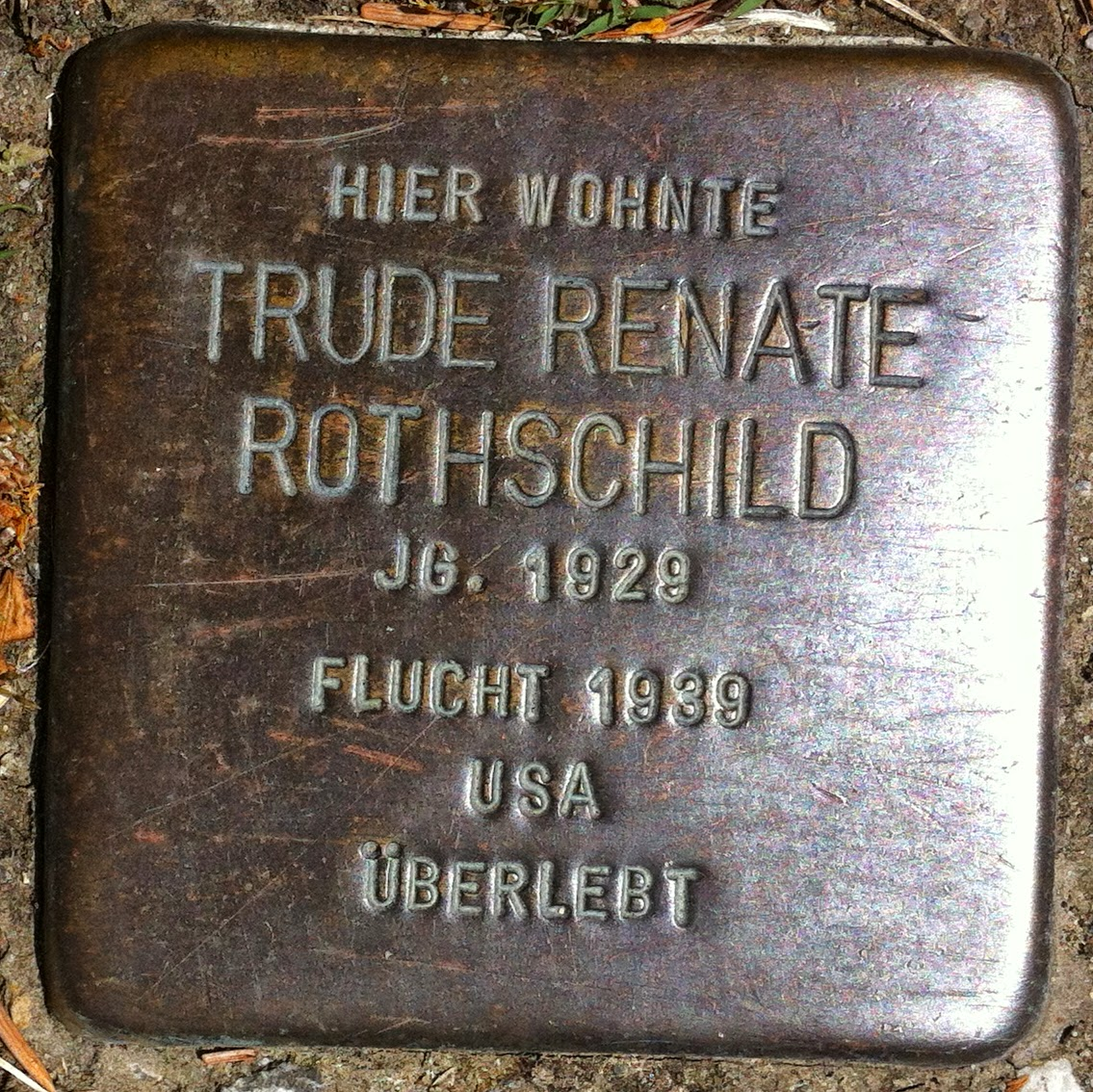 Deutschland (D) - Baden-Württemberg (BW) - Landkreis Konstanz (KN) - Stockach: Stolperstein "Trude Renate Rothschild"